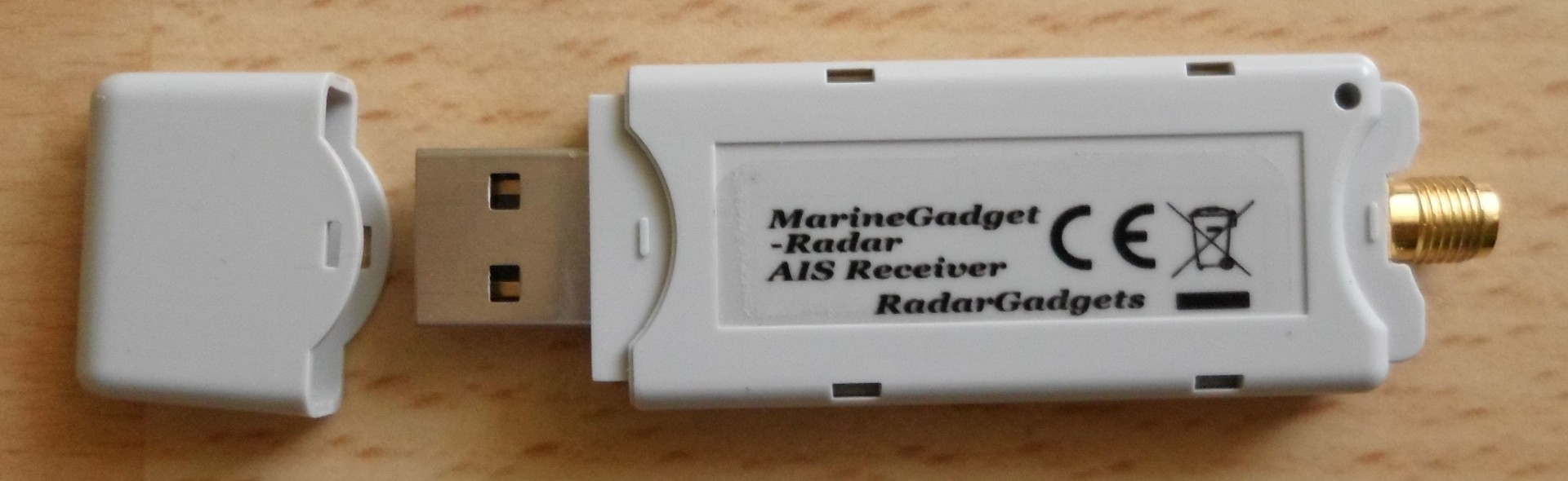 Miniaturowy odbiornik AIS w formie USB-stick (MarineGadget Radar)